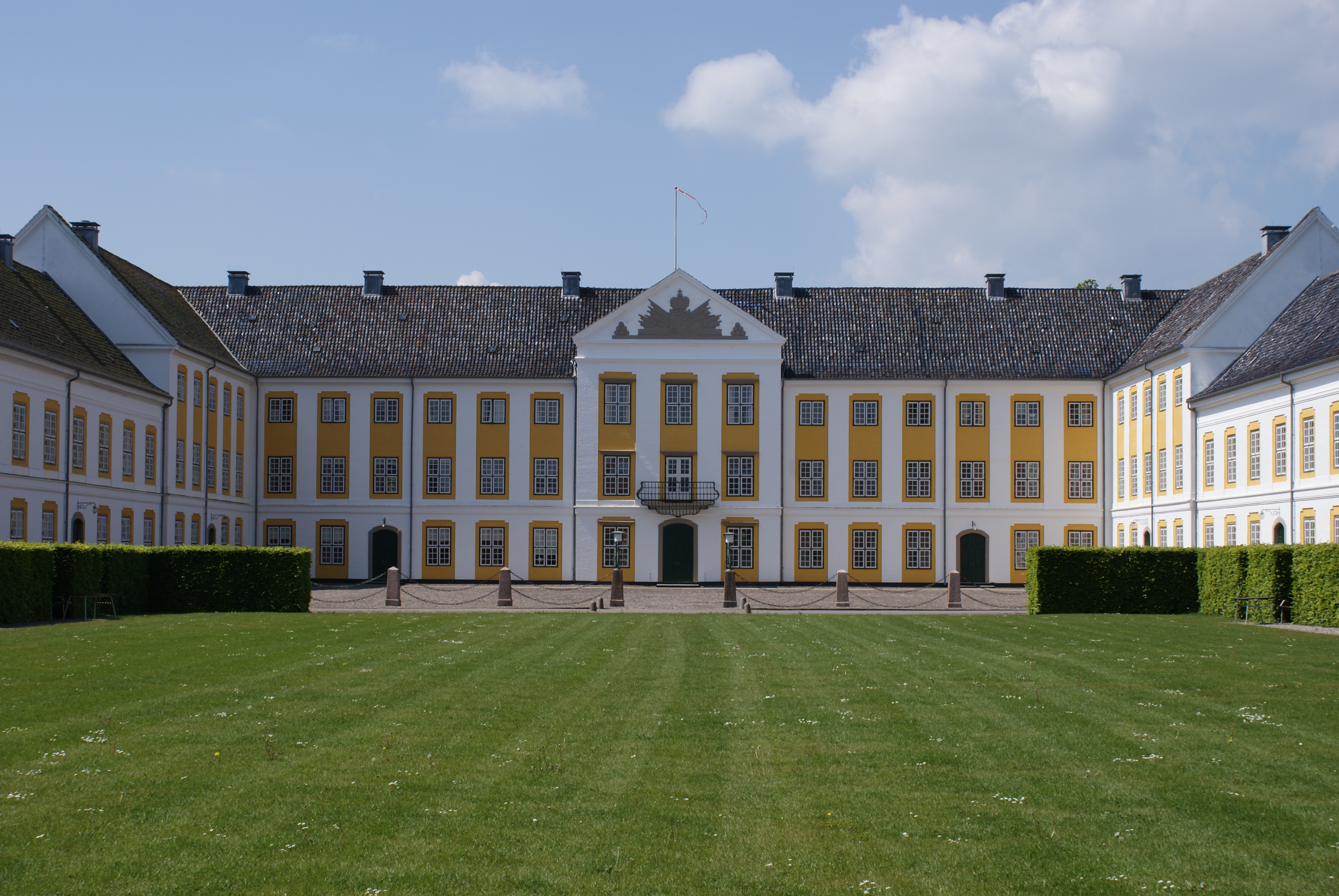 Schloss Augustenborg auf der dänischen Insel Als. Selbst fotografiert Febr. 2006. Kamera: Fuji FinePix S9500.